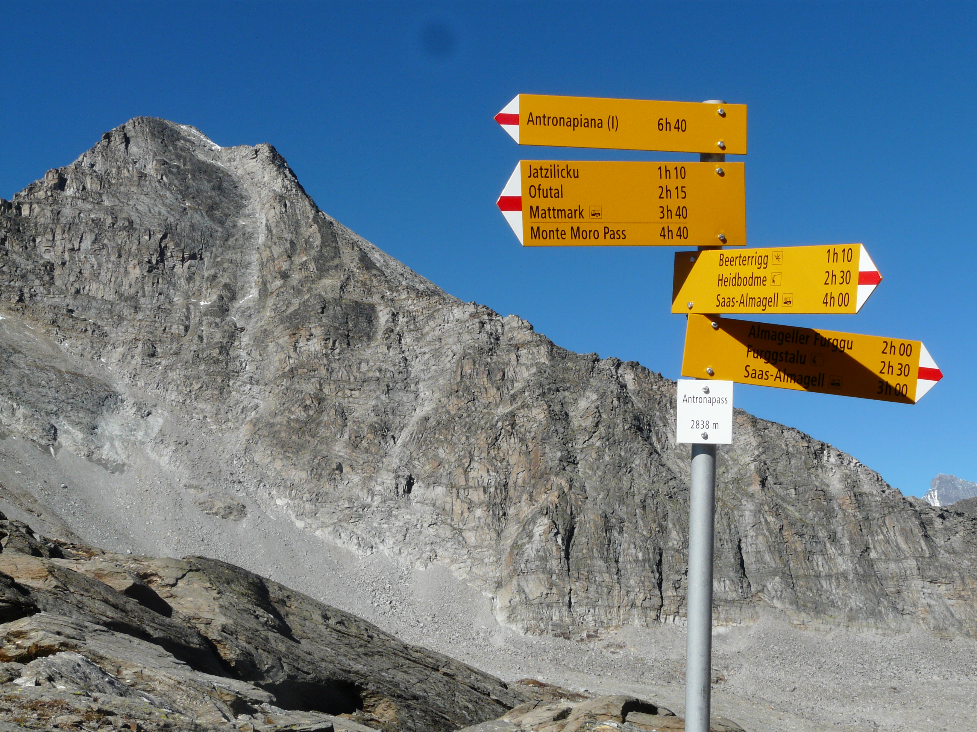 Wegweiser auf dem Antronapass